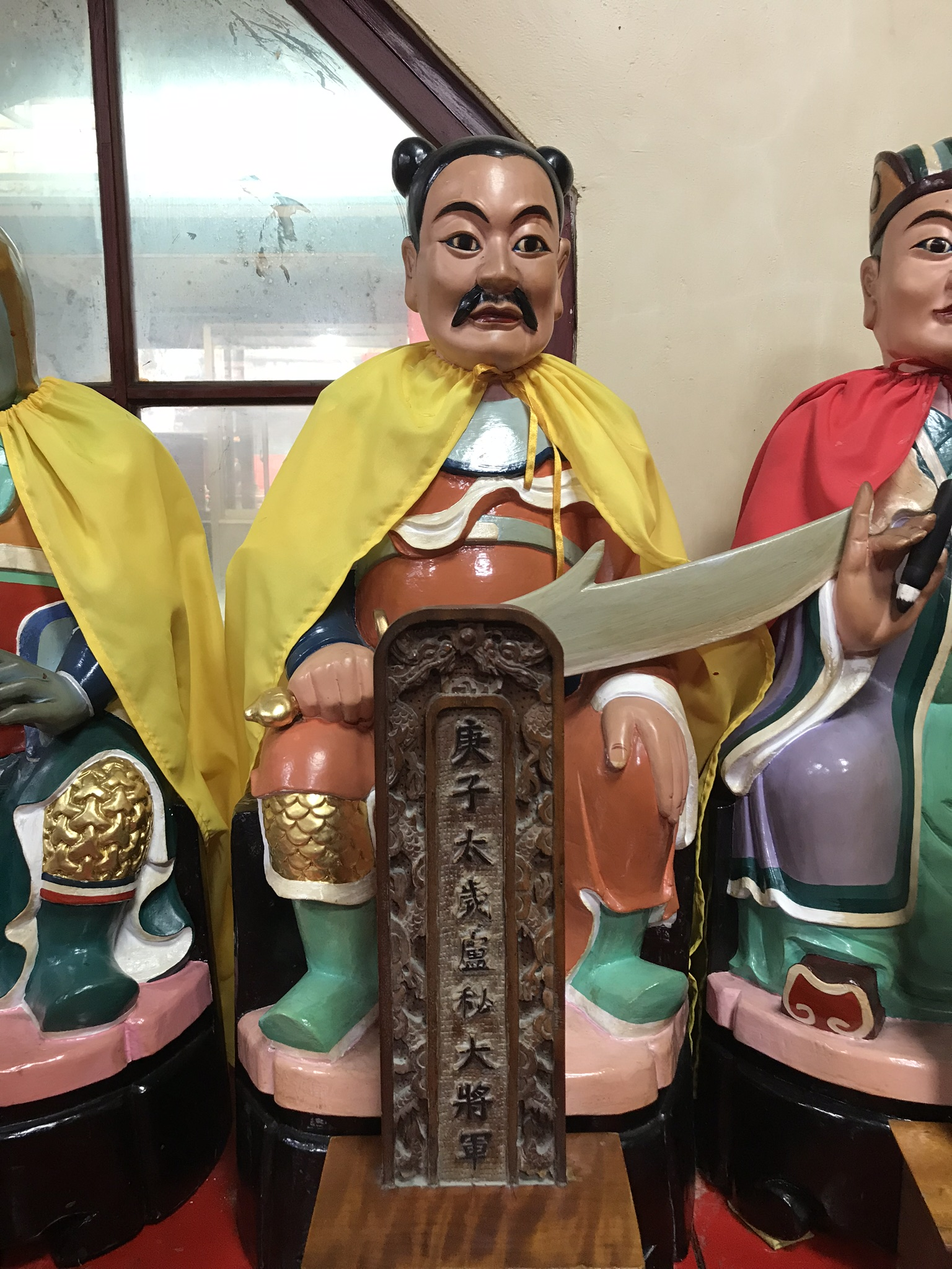 庚子太歲盧秘大將軍神像